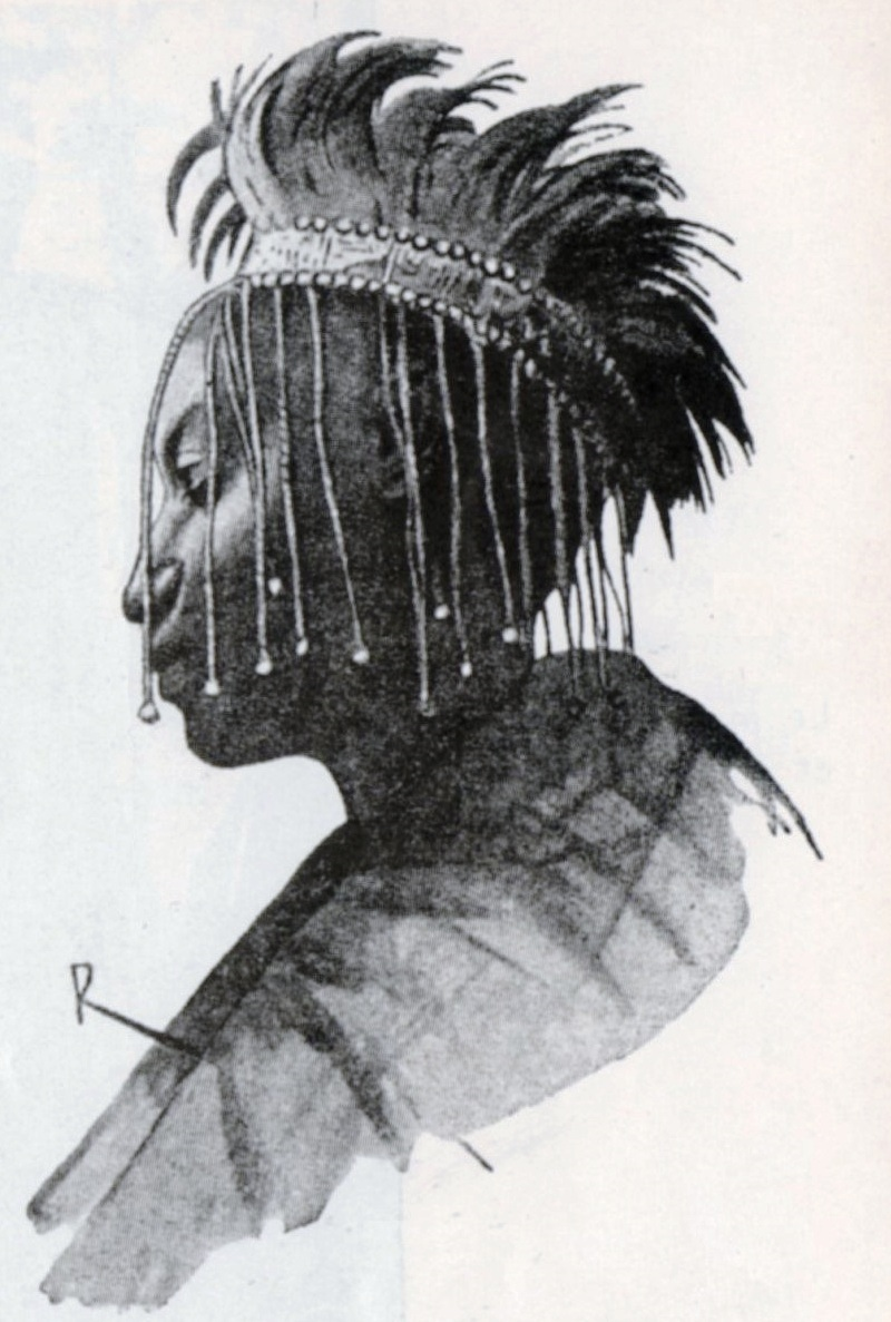 Portrait du Mwami Kigeri IV Rwabugiri avec sa coiffe en poils de singe colobe et perles de verre.